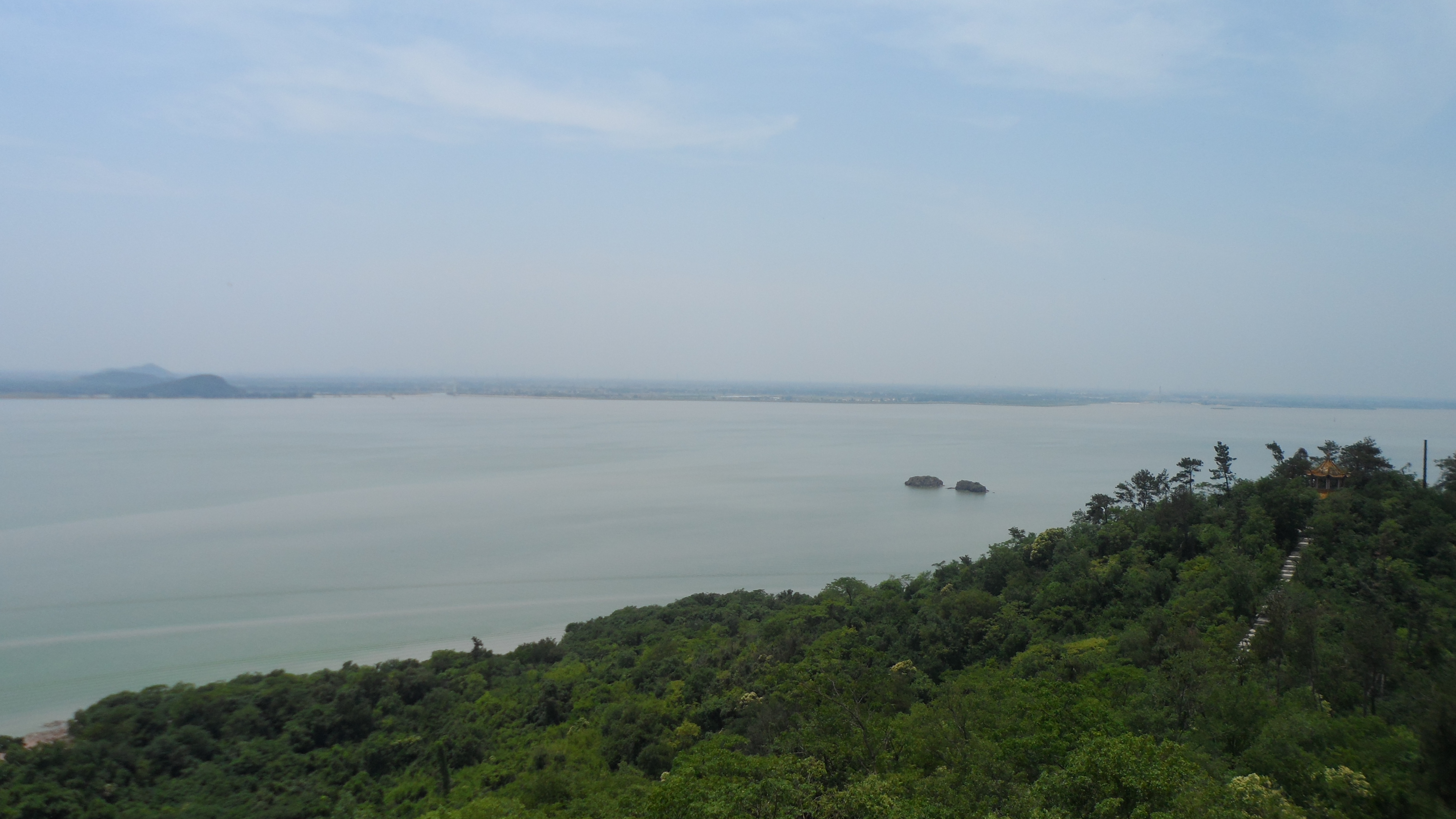 姥山岛文峰塔上看巢湖